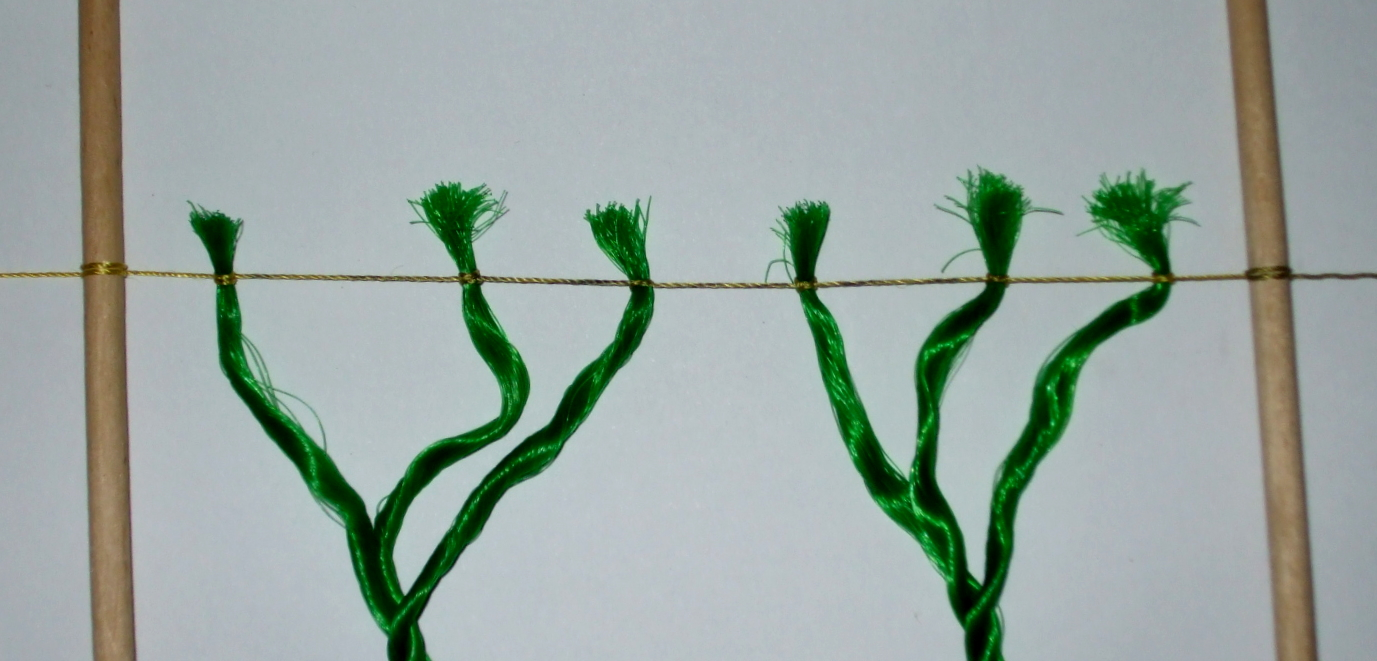 Würgeknoten um die Enden fest zusammen zu binden